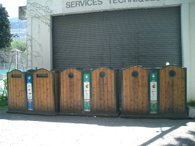 Lieu où il y a la possibilité de jeter verre, journaux pour le recyclage